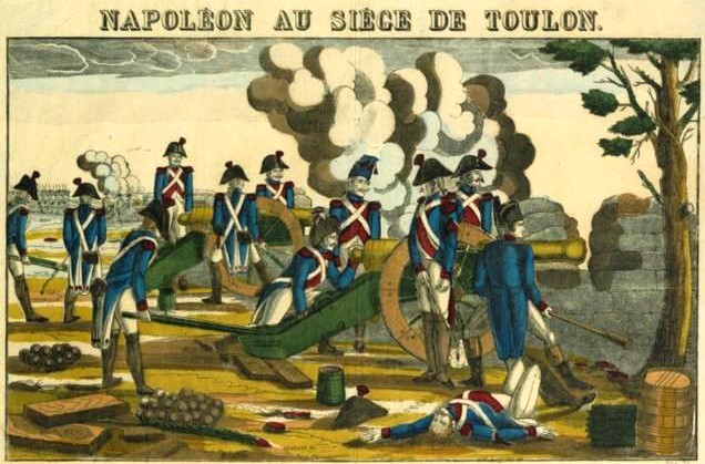 Bonaparte preparant la conquesta francesa de republicana de Tolon